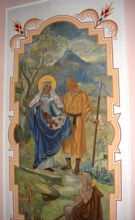 Schachtebich, kath. Kirche St. Magnus: Wandgemälde Rosenwunder der hl. Elisabeth